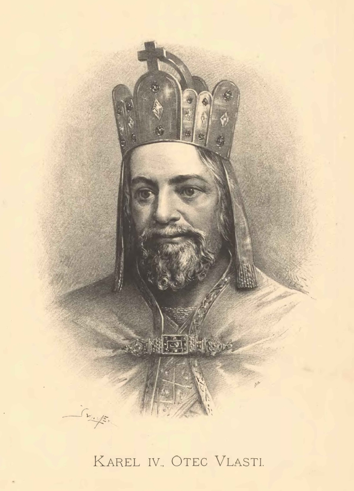 Portréty českých osobností od Jana Vilímka